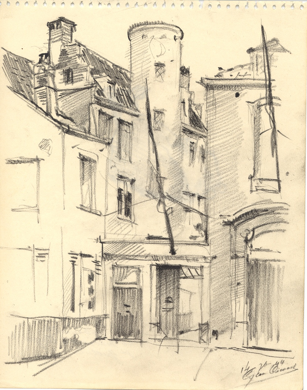 la maison du doyen de Sainte-Gudule rue du Bois-Sauvage à Bruxelles, dessin (croquis) par Léon van Dievoet, architecte (1907-1993), datant du 14 septembre 1944.